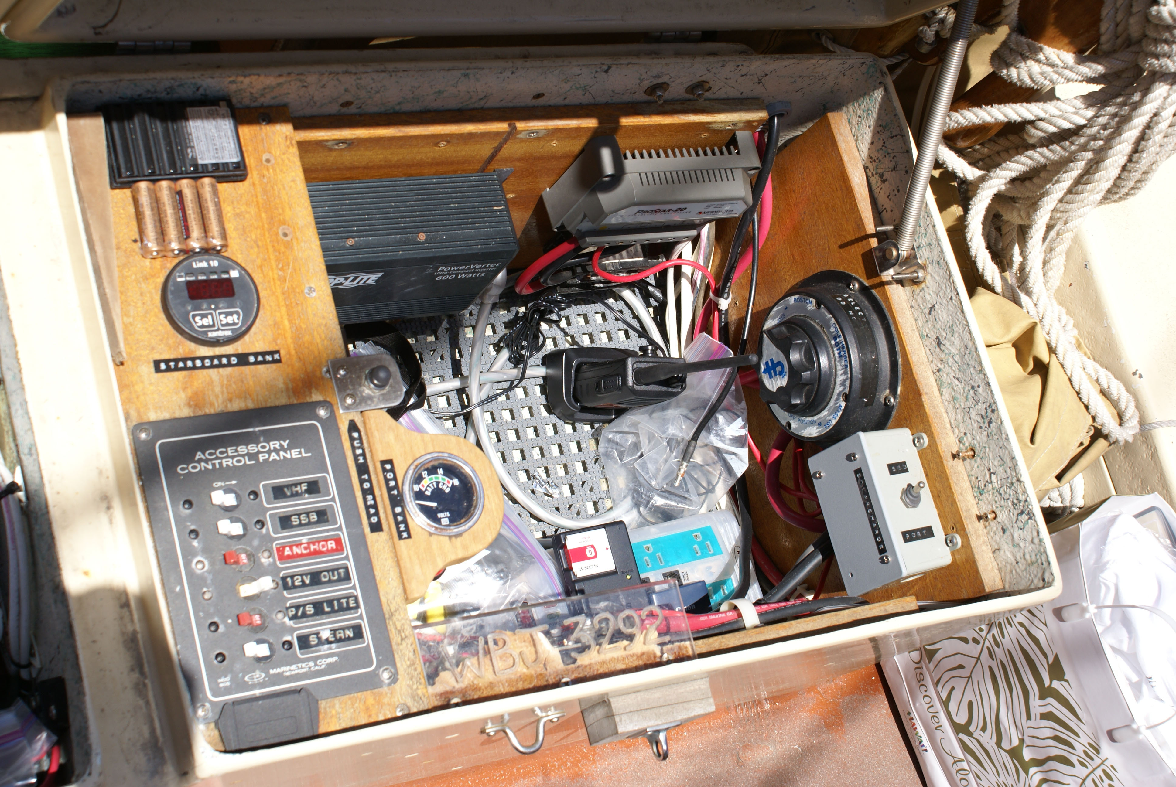 Hokule'a's radio system